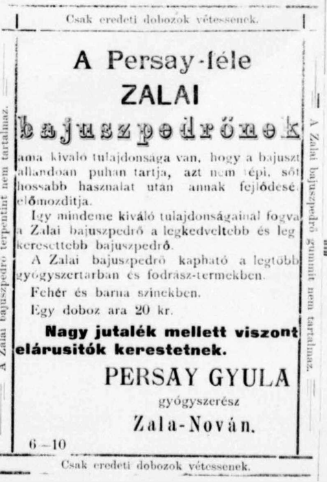 Persay-féle ZALAI bajuszpedrő reklámja 1897. Persay Gyula novai gyógyszerész terméke.